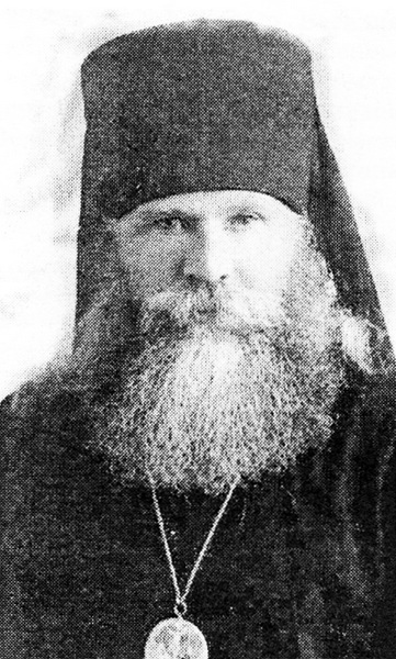 Епископ Кронштадтский Венедикт (Плотников)